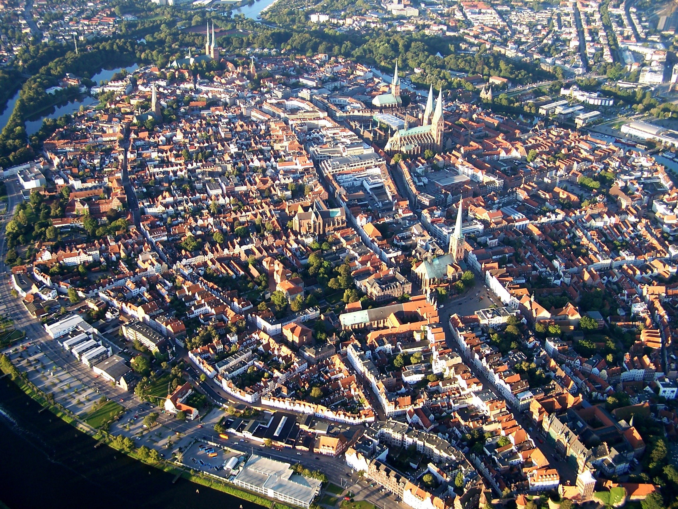 Altstadt von Lübeck, Luftaufnahme aus NNO. Zu erkennen sind (im Uhrzeigersinn): links oben der Turm von St. Aegidien und die Doppeltürme des Doms (am oberen Bildrand), rechts oben St. Petri (Turm vor Grünzone), Holstentor (kleine Doppeltürme westlich/rechts der Petrikirche), St. Marien (große Doppeltürme zwischen St. Petri und Holstentor). Hinter dem Chor von St. Marien sind die Türmchen des Rathauses erkennbar. Von St. Marien nach Norden (vorne) verläuft die Breite Straße zur Kirche St. Jakobi. Vor St. Jakobi der Koberg mit dem Heiliggeistspital links, ganz im Norden (unterer Bildrand rechts) das Burgtor mit sonnenglänzendem Dach und der Kanal-Hafen (links unten) mit direktem Anschluss (links außerhalb des Bildes) an den Elbe-Lübeck-Kanal (links oben im Bogen bis zur Mitte des oberen Bildrands). Am rechten Bildrand oben die Musik- und Kongresshalle, genannt „MuK“, die über eine Fußgängerbrücke direkt aus der Altstadt erreichbar ist. Vor der Musikhalle ist auf der Untertrave der südliche Abschnitt des Museumshafens Lübeck erkennbar, der sich entlang des Altstadtufers nach Norden/nach rechts weiter außerhalb des Bildes erstreckt.